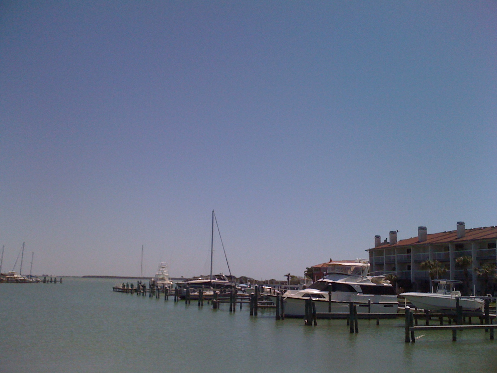 Tierra Verde, FL 33715, USA